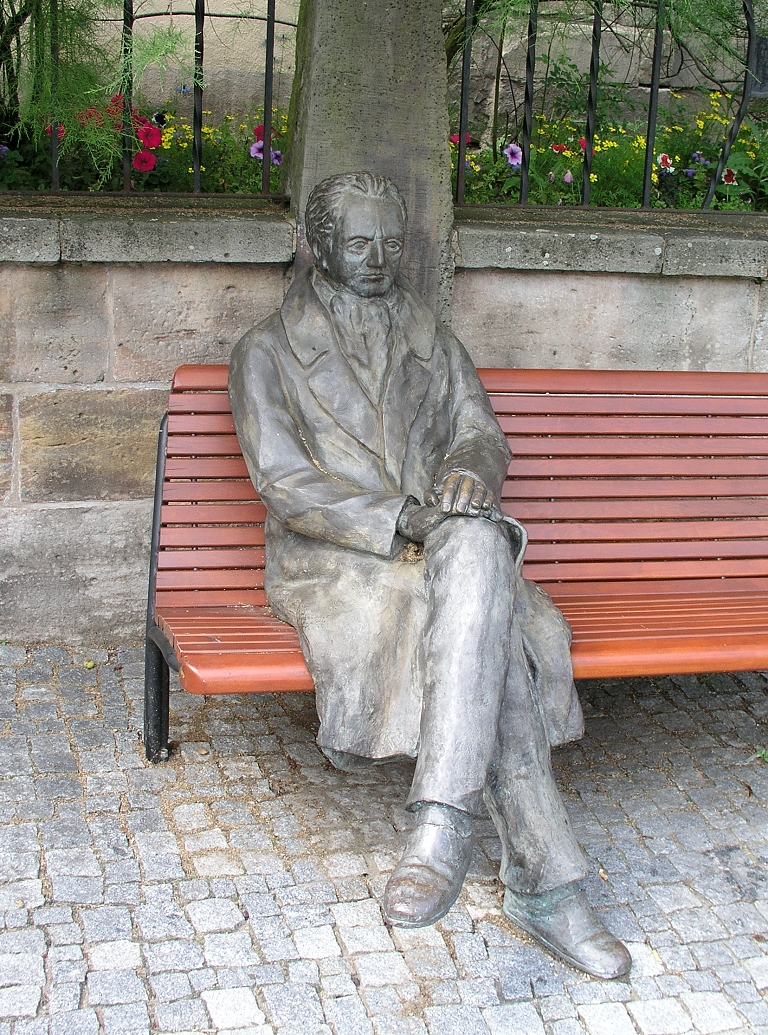 Das Bild zeigt das Goethe-Denkmal am Ilmenauer Markt vor dem Amtshaus. Die Bronzefigur wurde vom Bildhauer Klaus Glutting aus Ilmenaus Partnerstadt Homburg gefertigt.